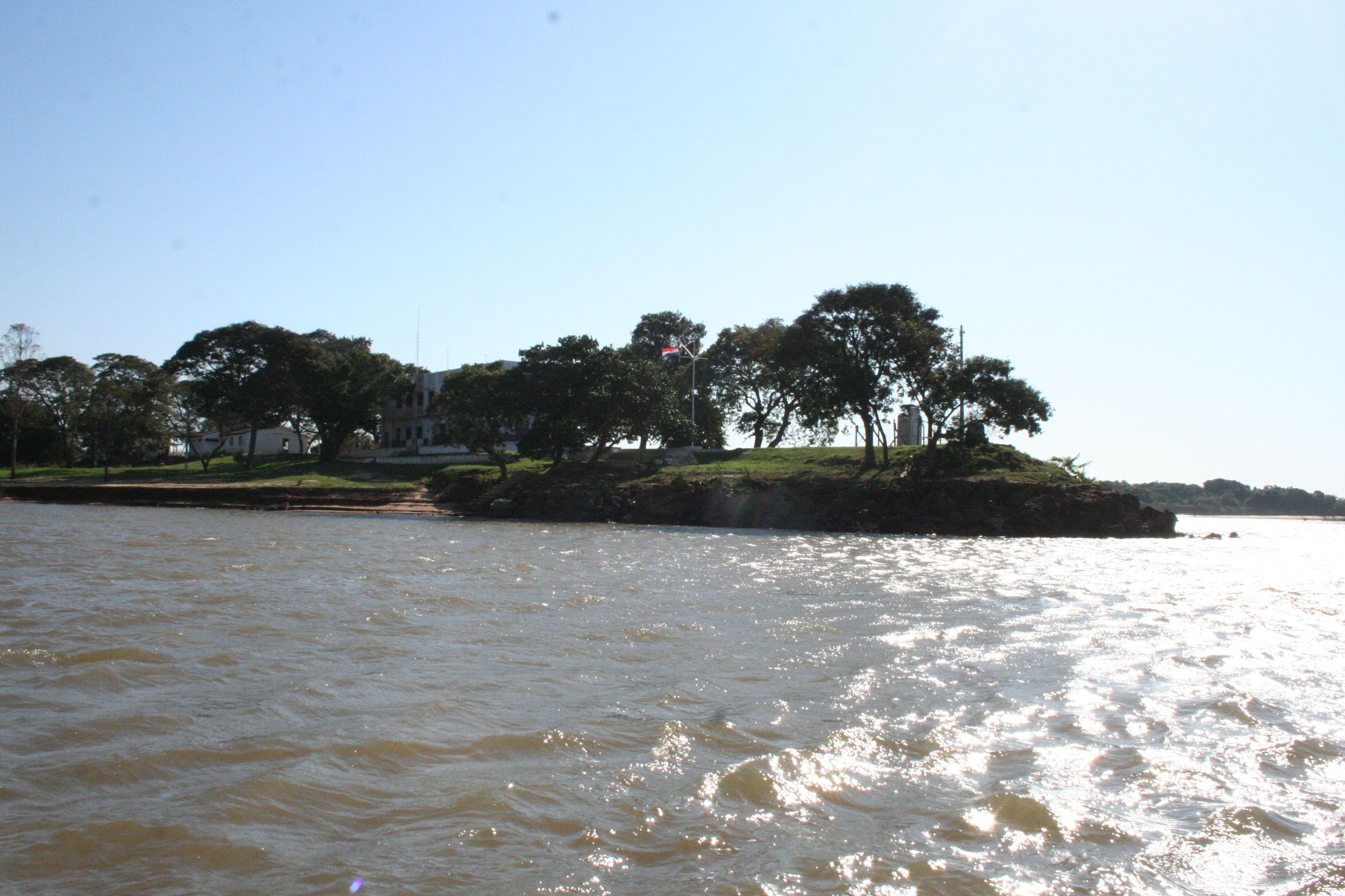 ITAPIRU